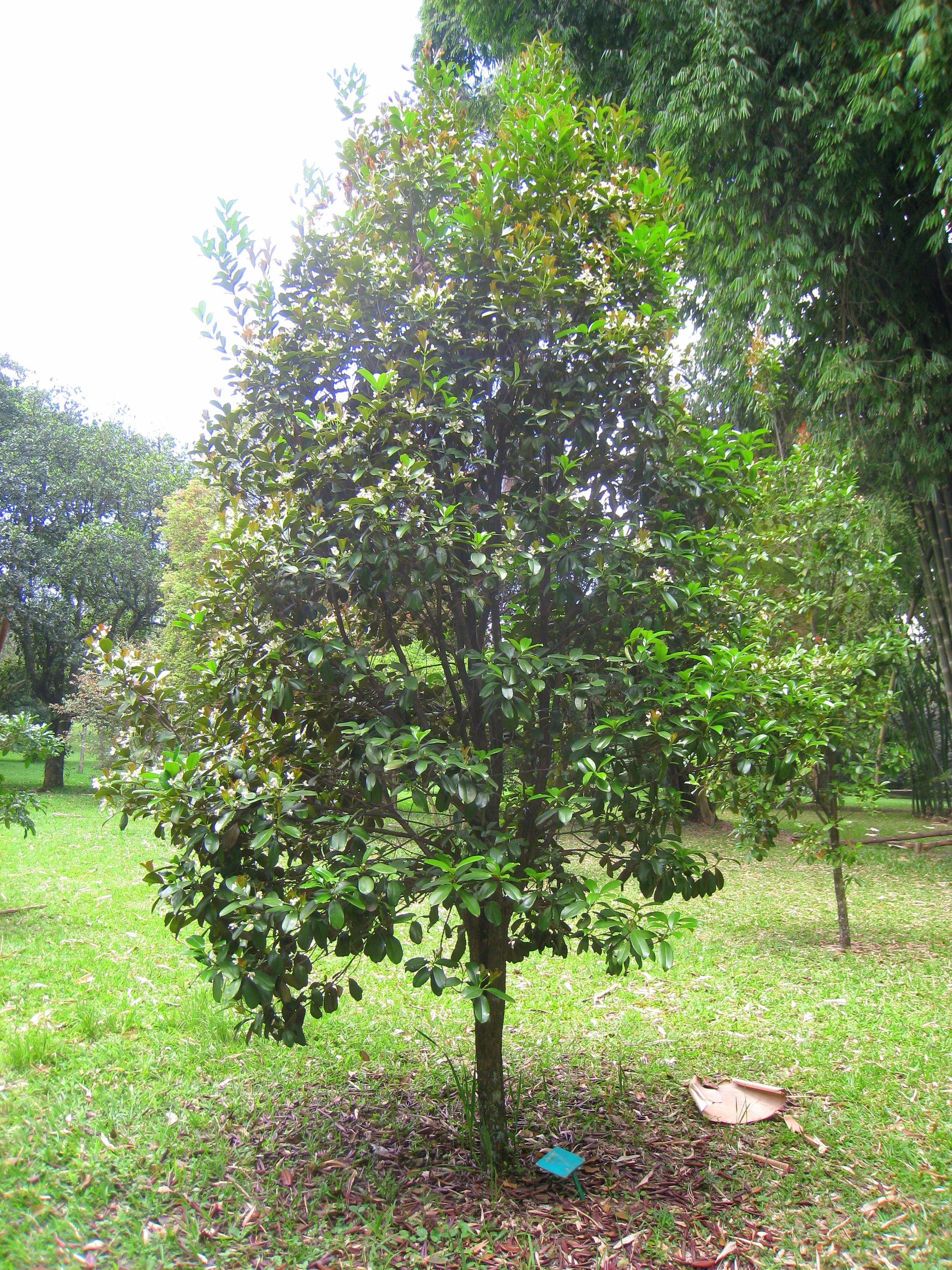 Eugenia brasiliensis in the Jardim Botânico de São Paulo, São Paulo City, SP, Brazil.